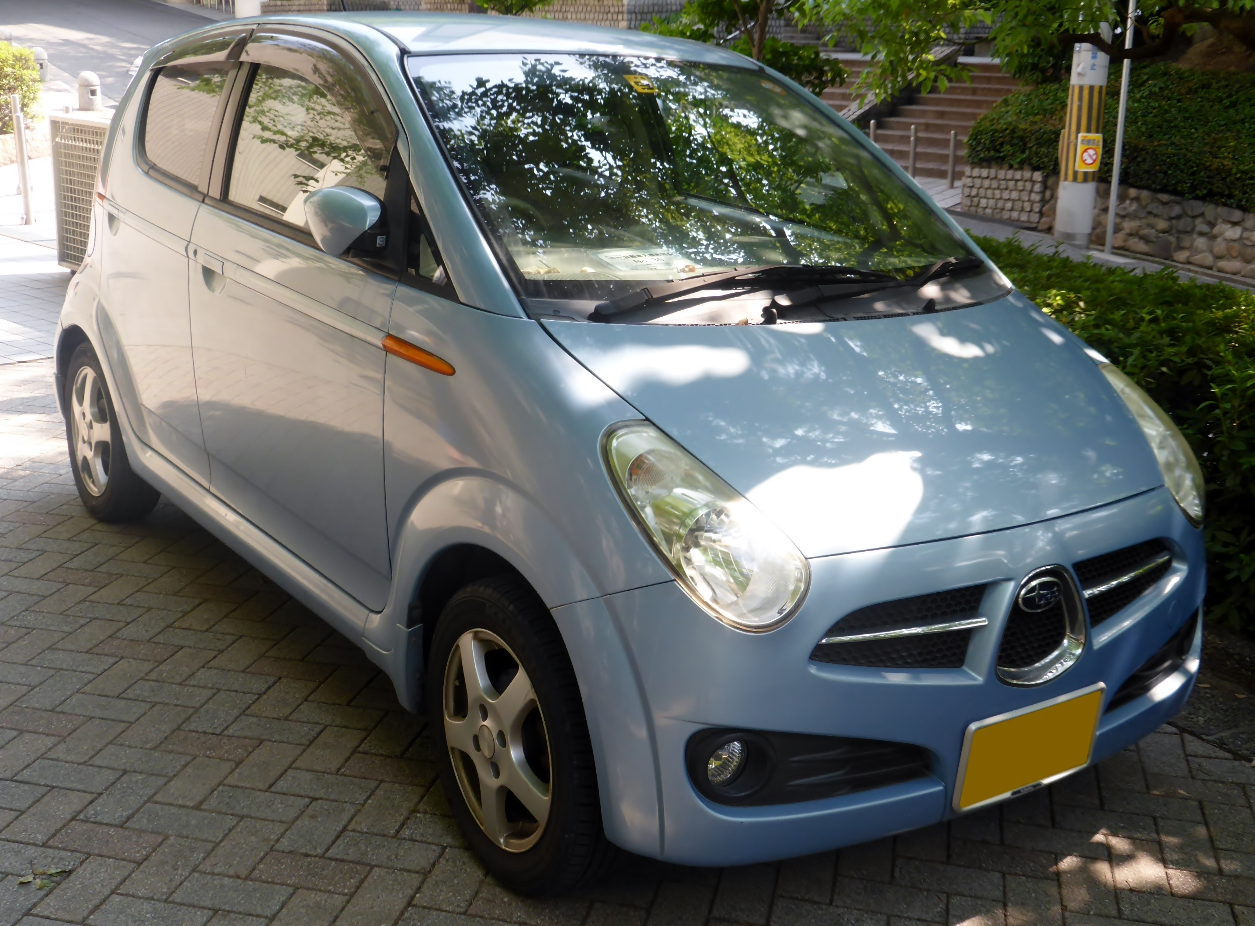 RC1型スバル・R2 i カジュアルをフロントから撮影。